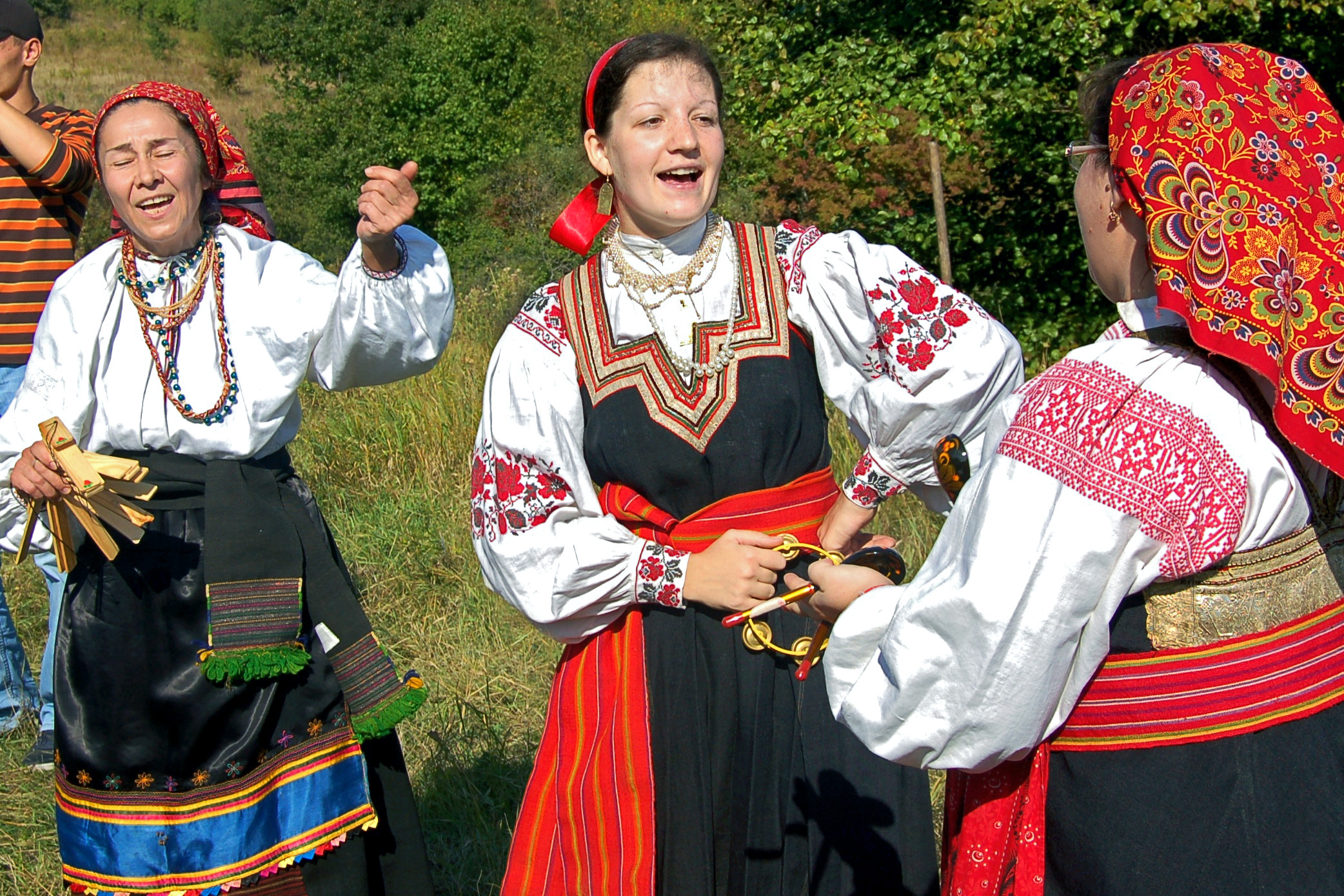 Праздник урожая в родовом экопоселении «Кореньские родники». 2010 г. (Сарафан конца XIX века Грайворонского района Белгородской области. Из фондов Белгородского государственного музея народной культуры)